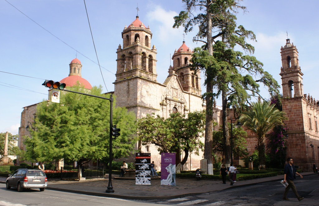 Biblioteca Pública de la Universidad Michoacana ubicada en Av. Madero Poniente esquina con Nigromante, Centro Histórico de Morelia, Michoacán, México. Fundada en 1930, conserva un fondo bibliográfico antiguo de 22,901 volúmenes, que van desde el siglo XV hasta principios del siglo XX. El edificio donde tiene su sede la biblioteca fue un templo de los Jesuitas durante la época del Virreinato de la Nueva España, construido en el siglo XVII en estilo barroco. En sui interior la biblioteca conserva murales al fresco pintado a mediados del siglo XX por los artistas estadounidenses Hollis Howard Holbrook, S. C. Schoneberg y R. Hansen así como del mexicano Antonio Silva Díaz.